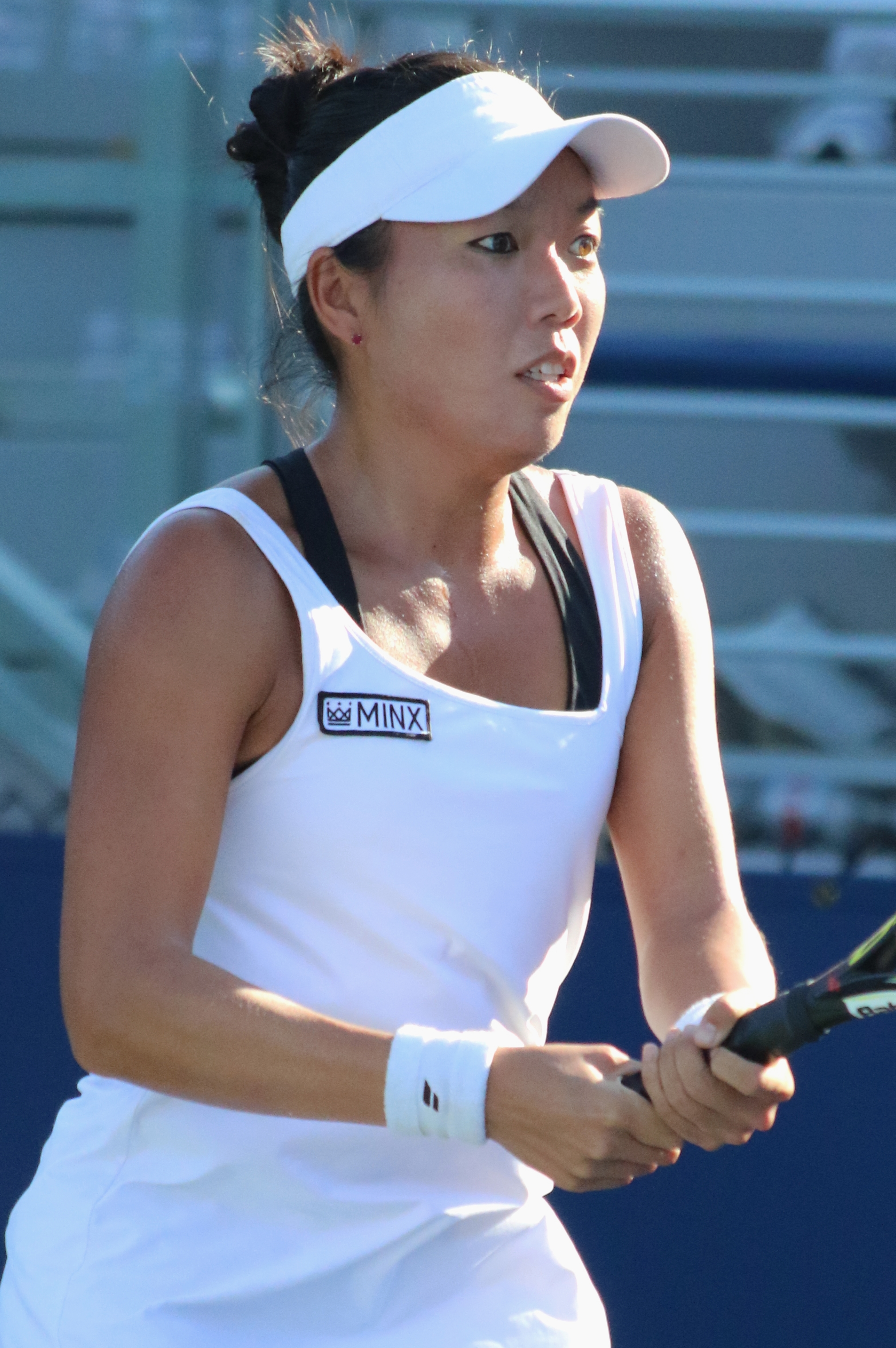 King V. US16 (4)